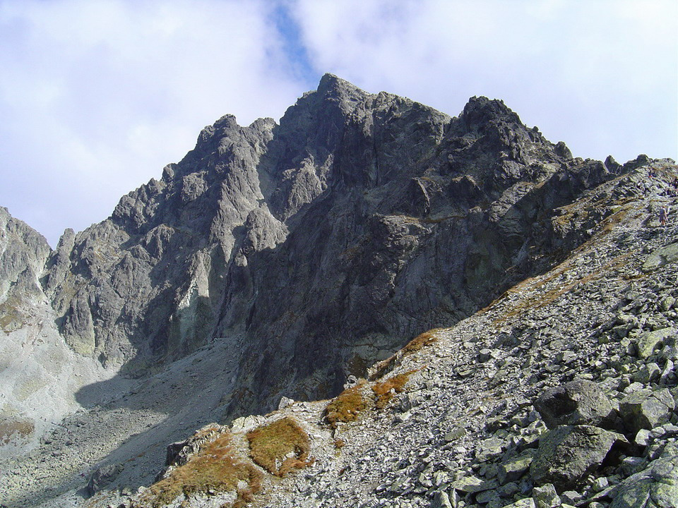 Vychodna Vysoka from Polsky hreben